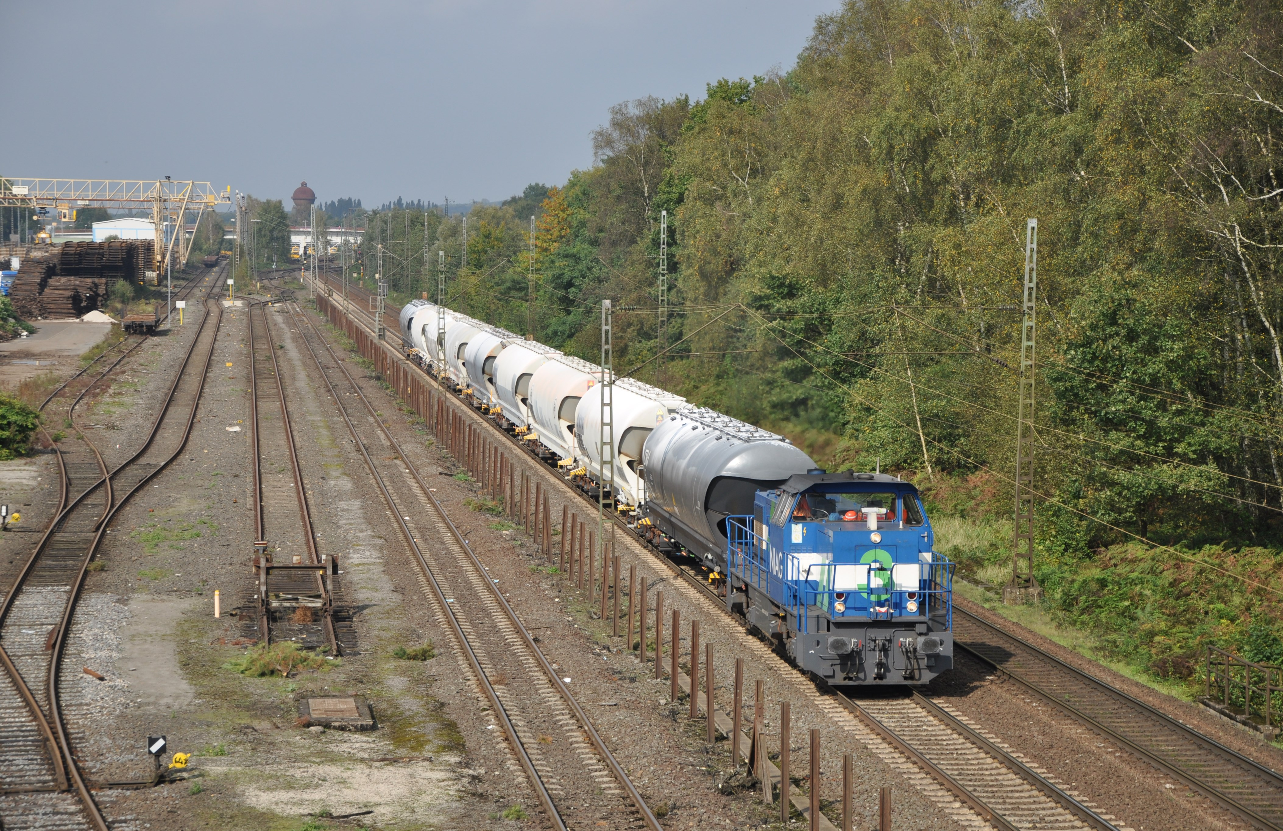 Lok 3 der NIAG in Duisburg-Entenfang; Fahrtrichtung Ratingen-Lintorf.